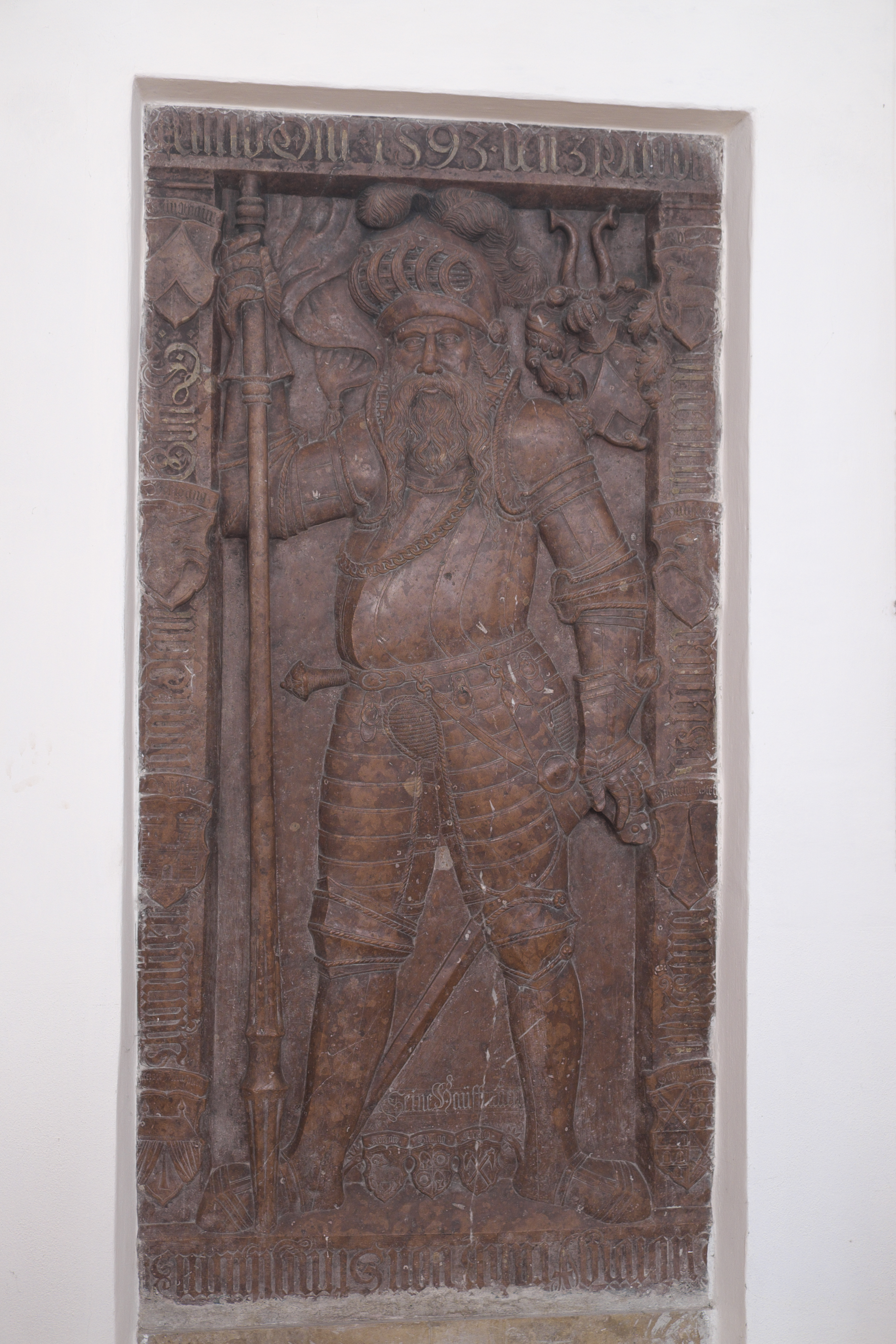 Katholische Pfarrkirche St. Laurentius in Neustadt an der Donau im niederbayerischen Landkreis Kelheim (Bayern/Deutschland), Rotmarmorplatte des Pflegers Ludwig von Stinglheim († 1593), mit dem Relief des Verstorbenen